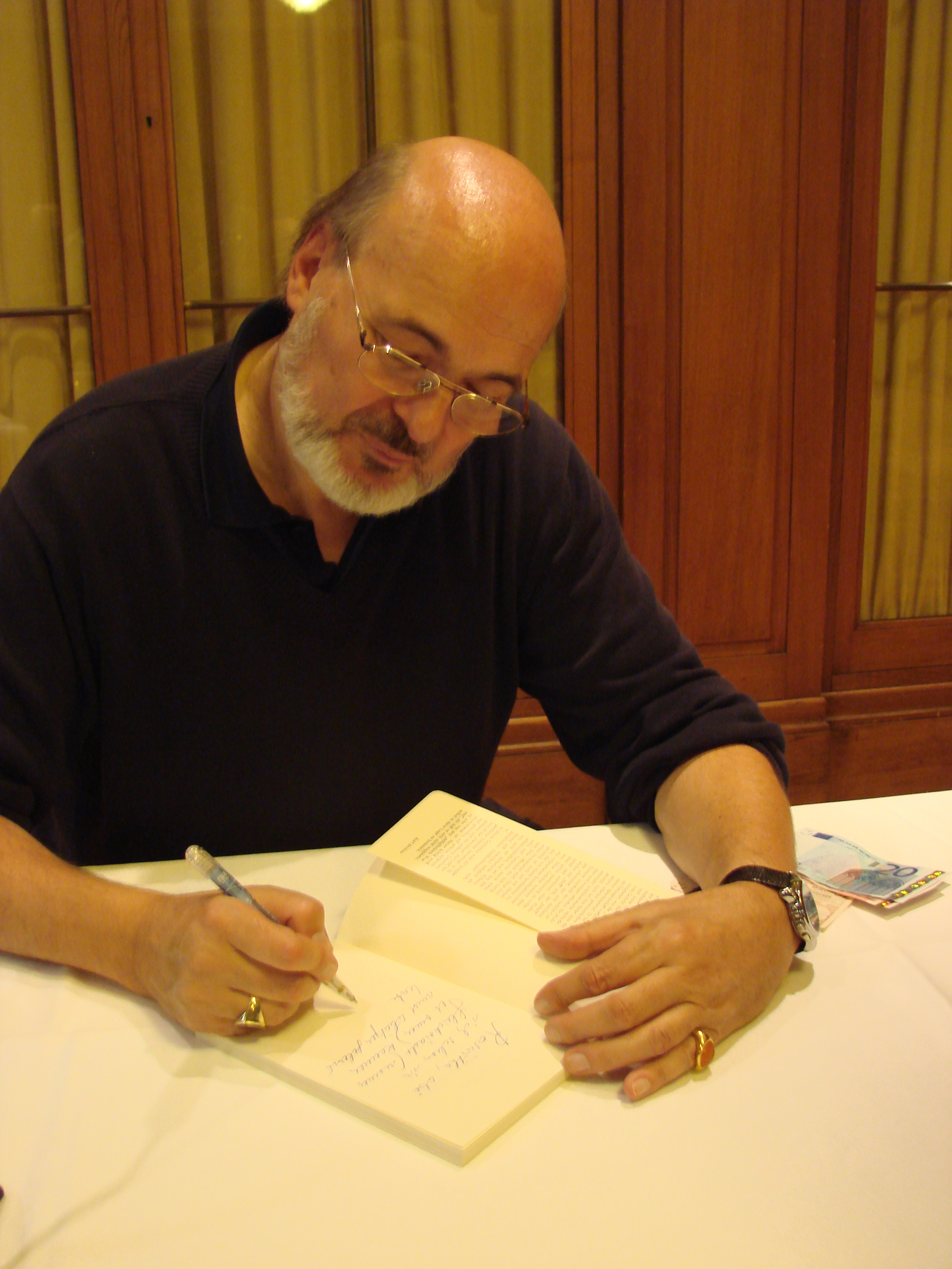 Wolfgang Mayer König beim Hamburger Autorenverband, August 2008